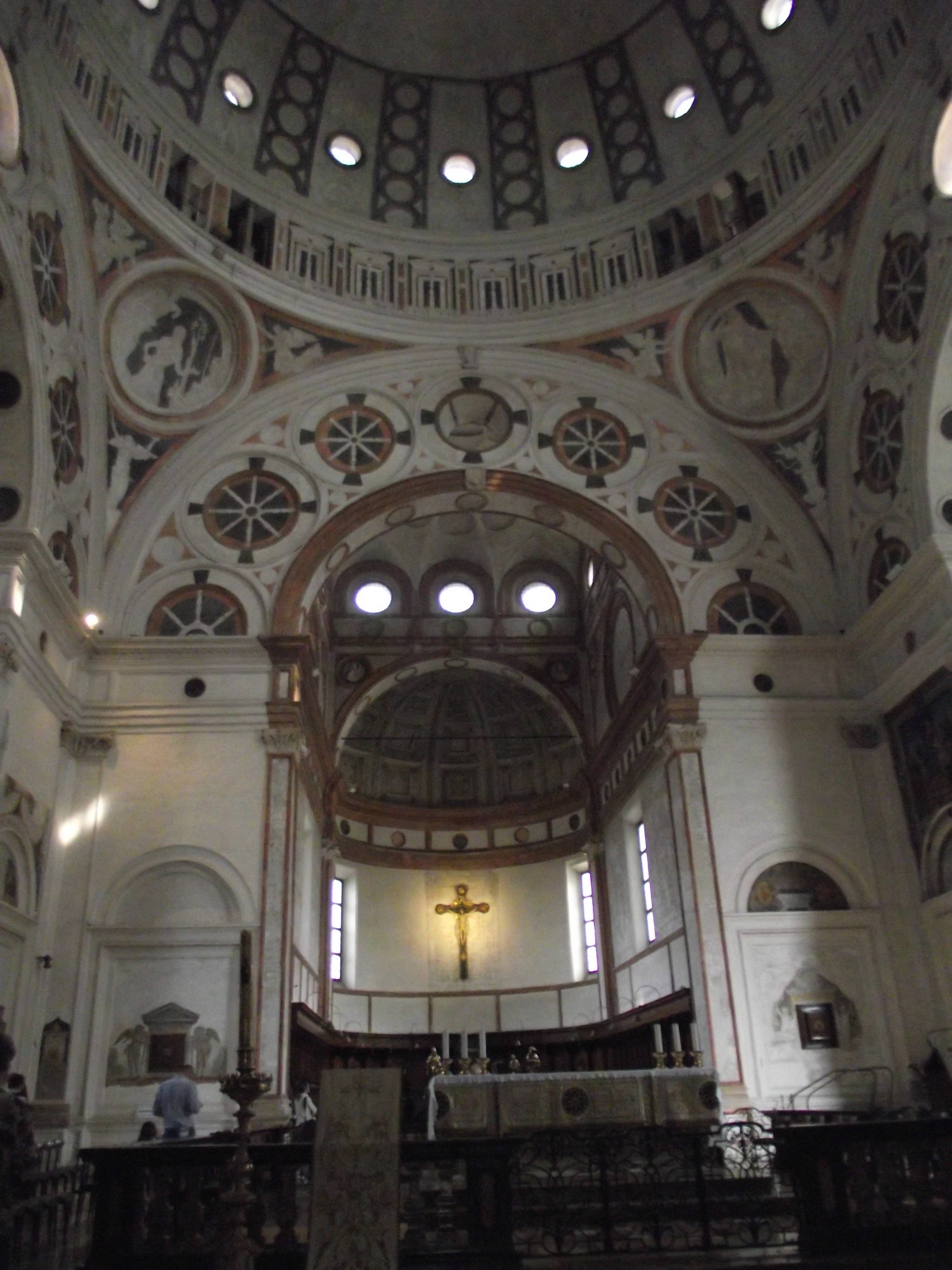 Presbiterio